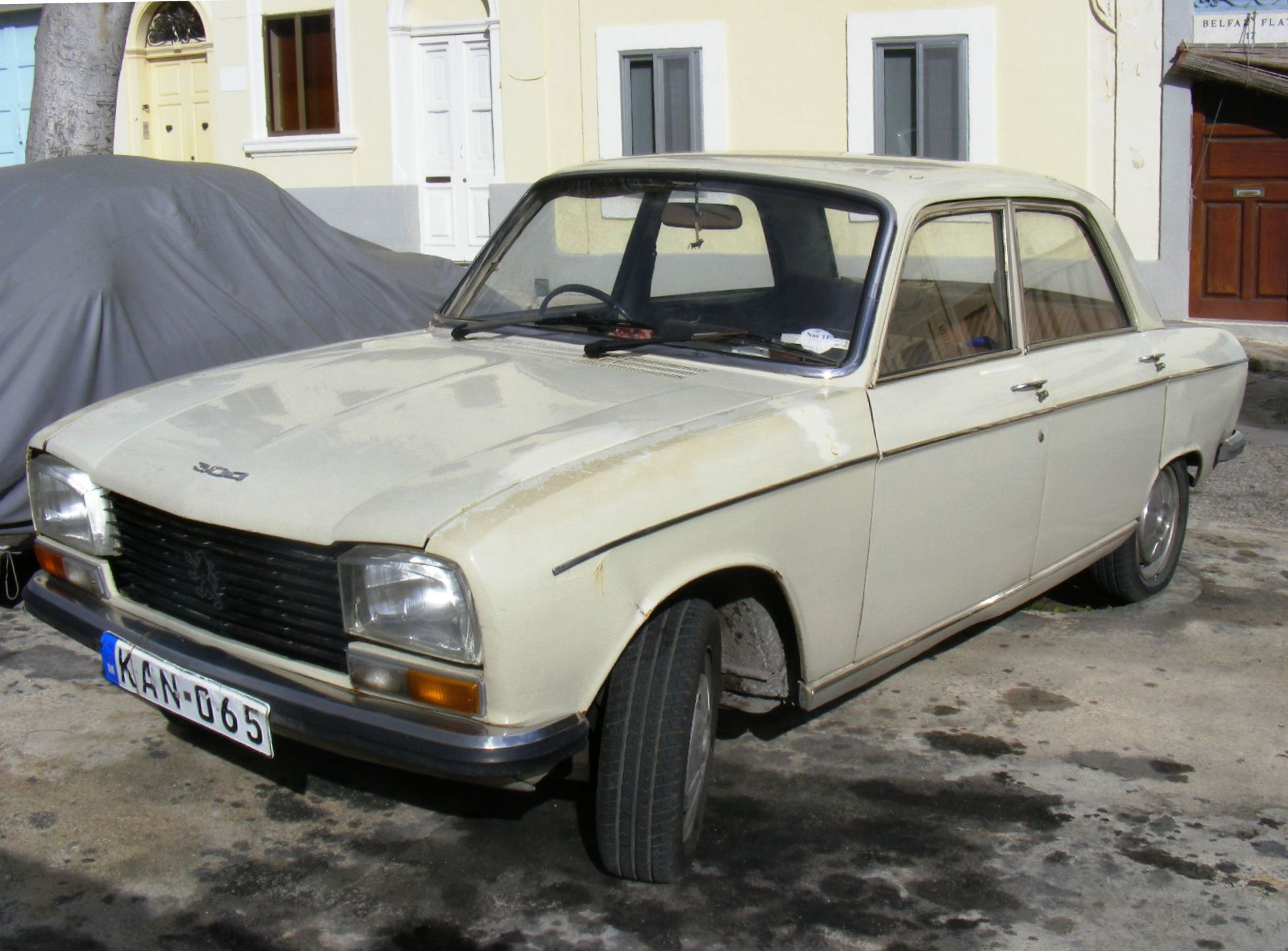 Peugeot 304, Malte fev 2011. 1969-1972 model with the lower rounder roof, shared with the 204.